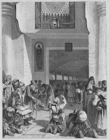 Вхід у Дальні печери Києво-Печерського монастиря.